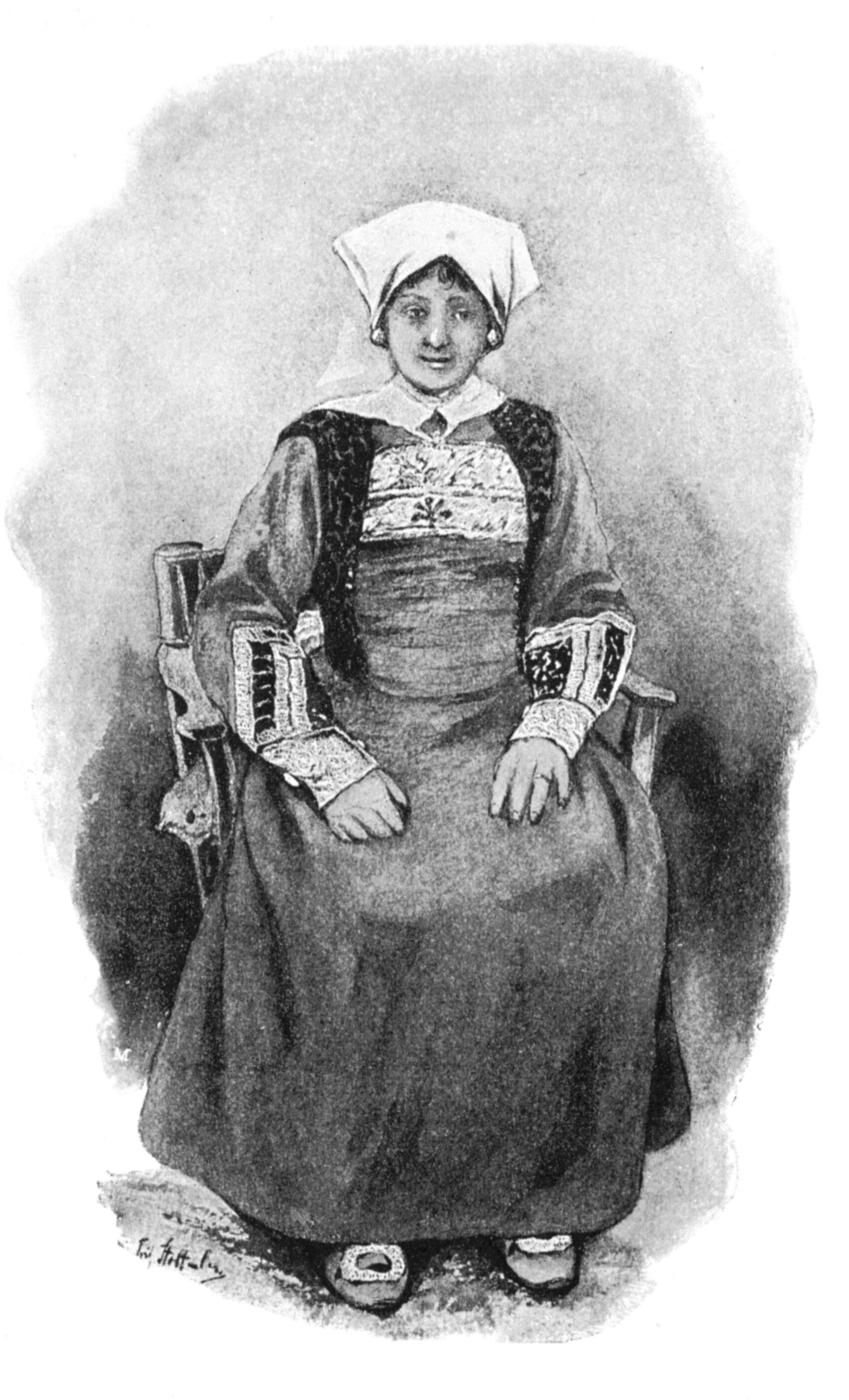 Tracht aus Ostenfeld, Kreis Nordfriesland.